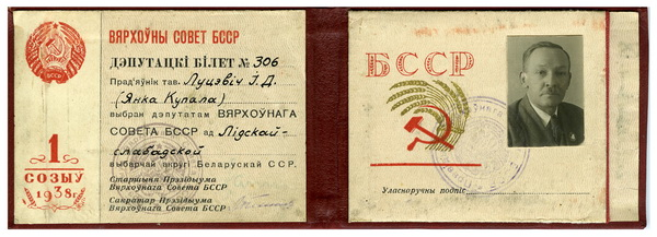 Дэпутацкі білет Янкі Купалы па Лідскай-Слабадской выбарчай акрузе №306 Вярхоўнага Савета БССР